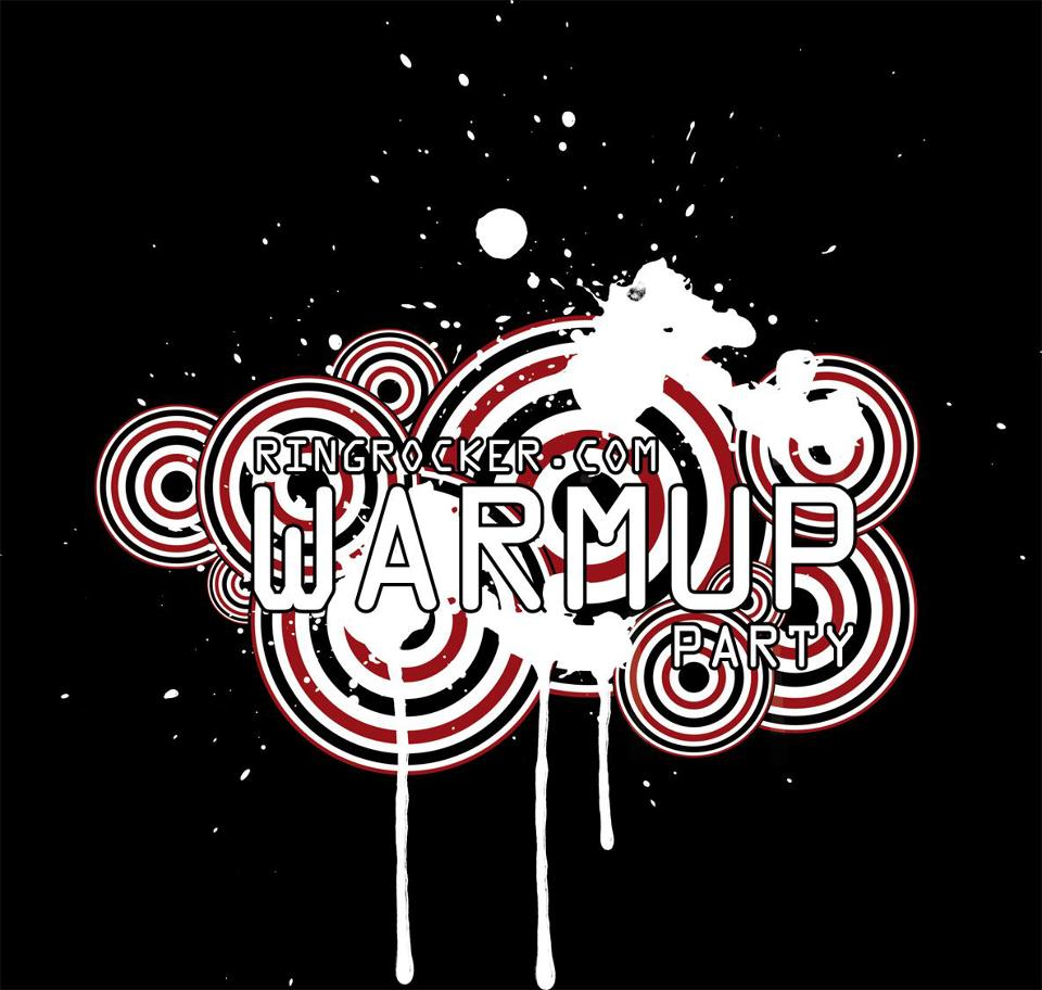 Logo der ringrocker Warm Up Party